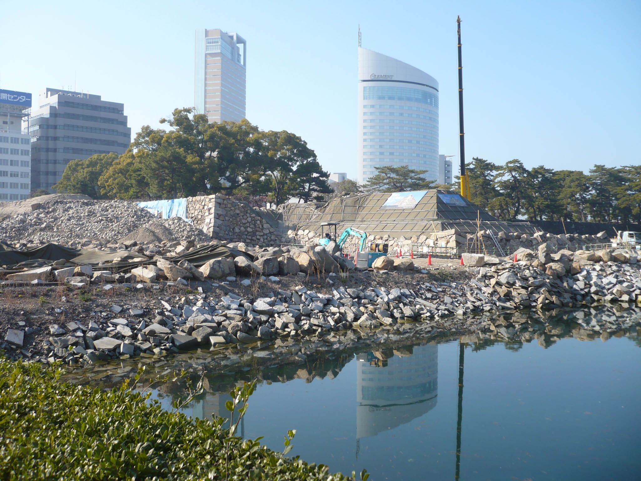 天守復元工事中